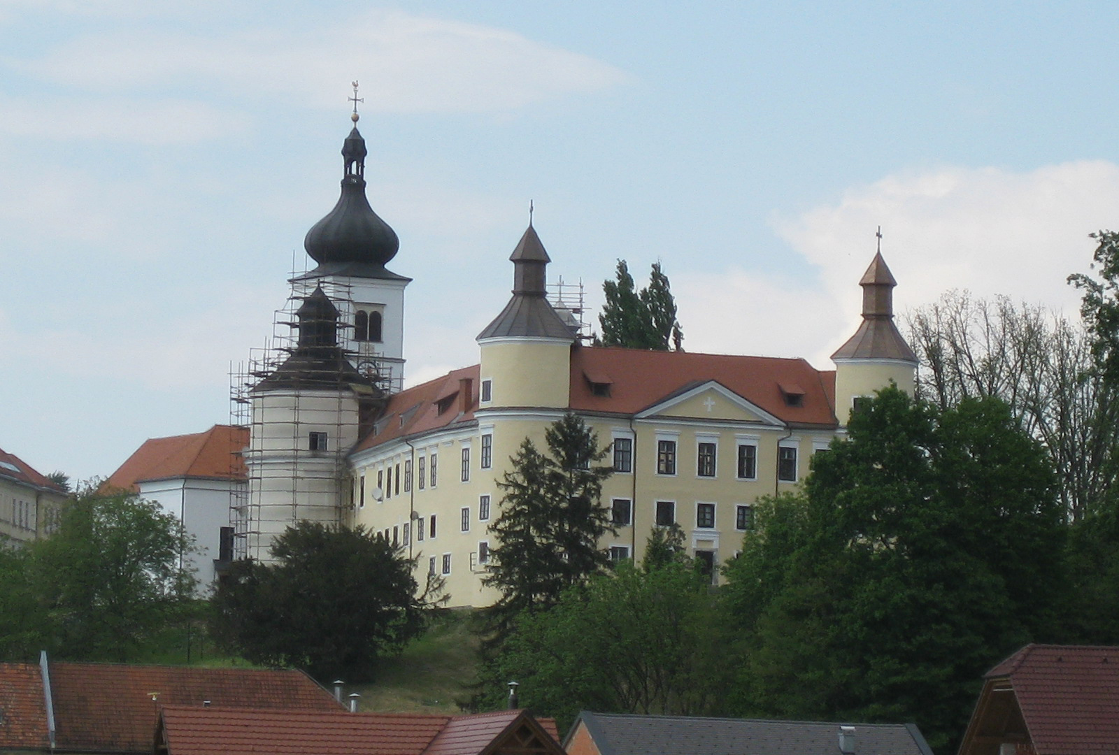 Velika Nedelja, village and castle/church in Slovenia